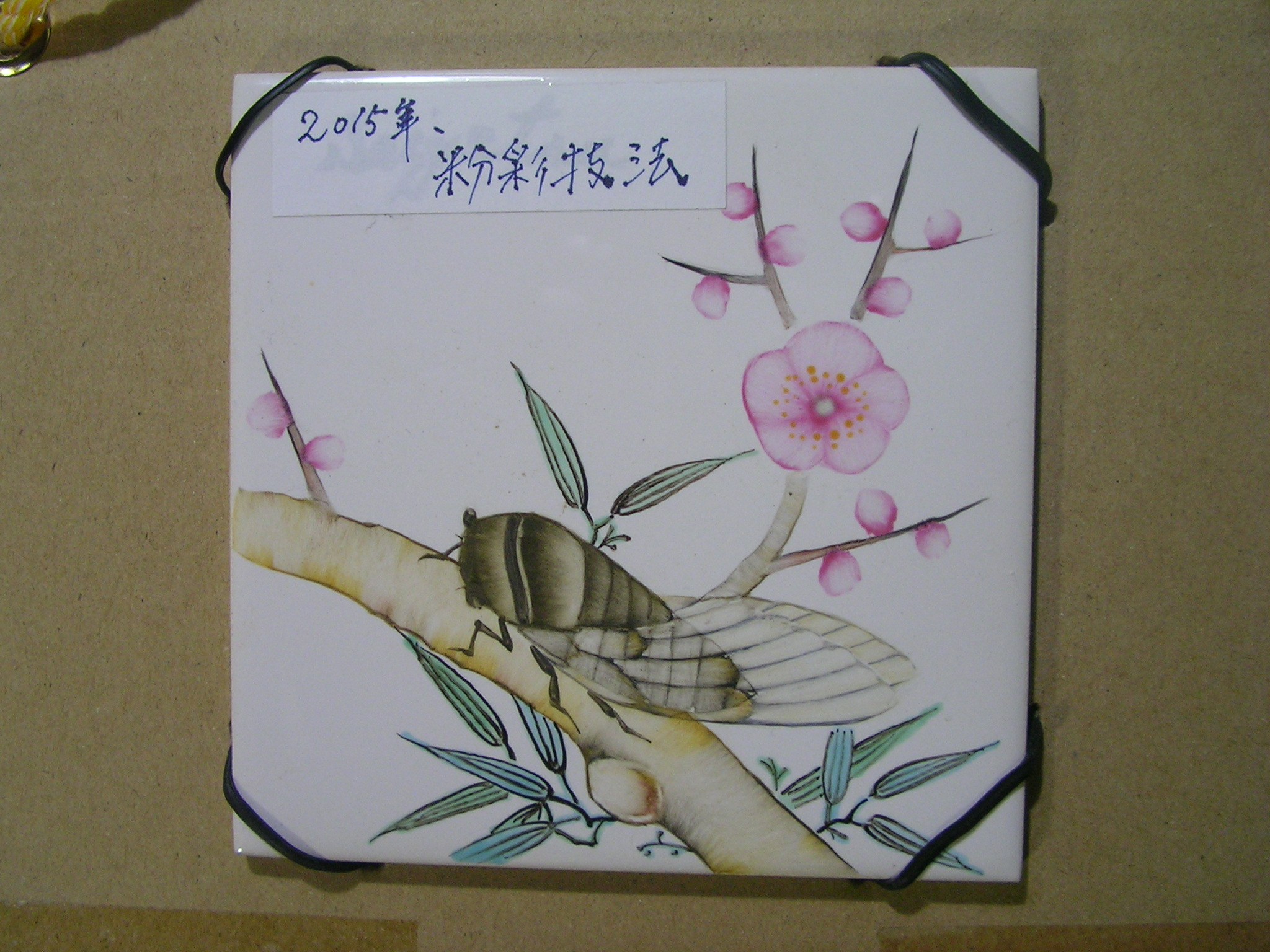 粉彩技法を用いた事例